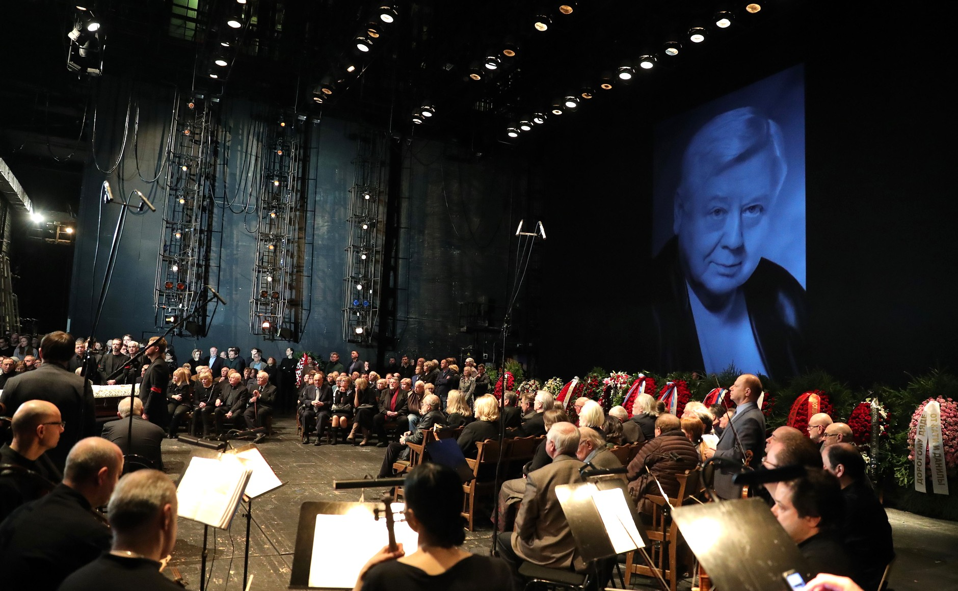 Церемония прощания с Олегом Табаковым, народным артистом СССР, руководителем Московского Художественного театра им. А. П. Чехова